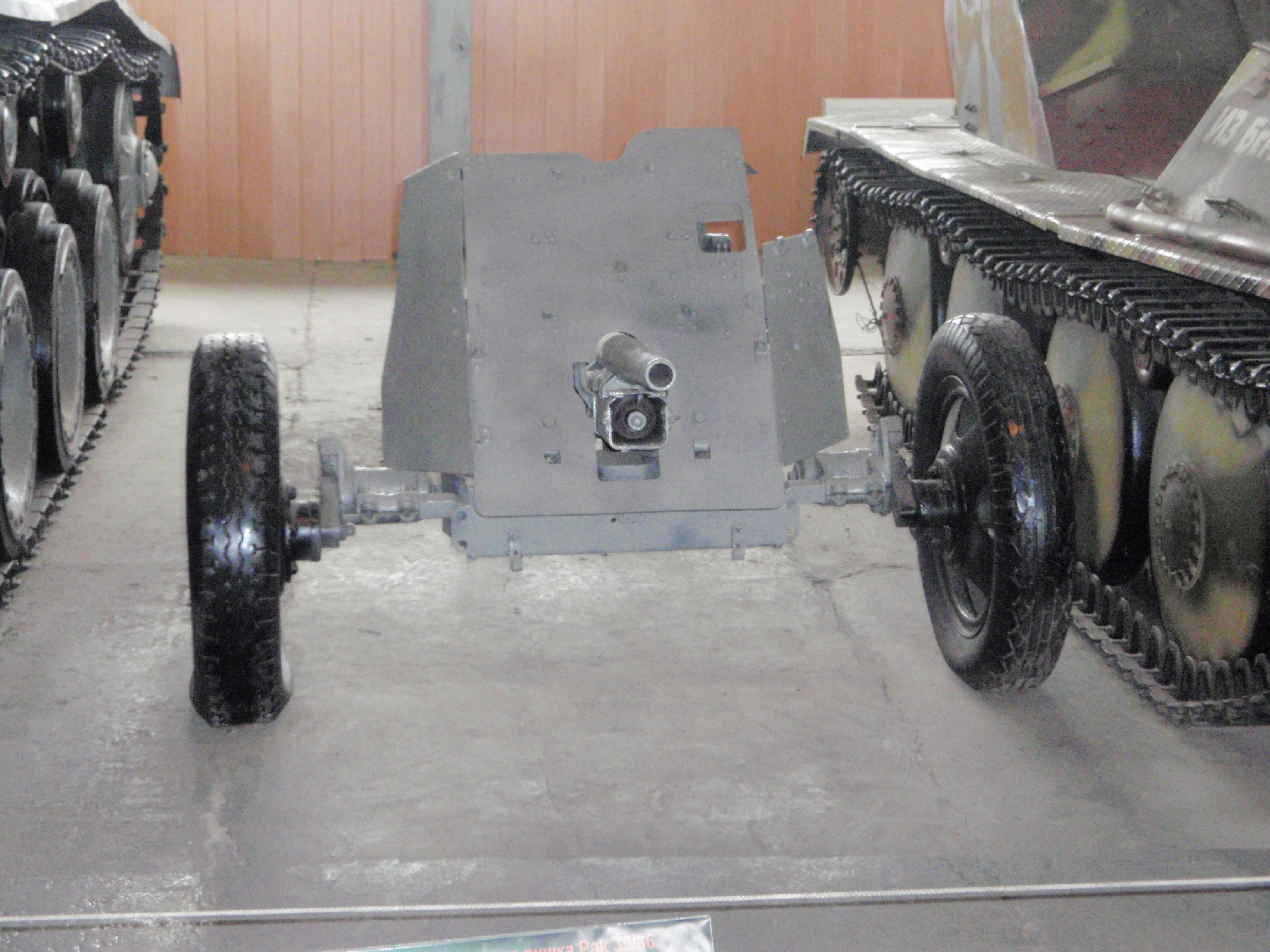 Немецкая противотанковая пушка Pak 35-36 в Кубинке